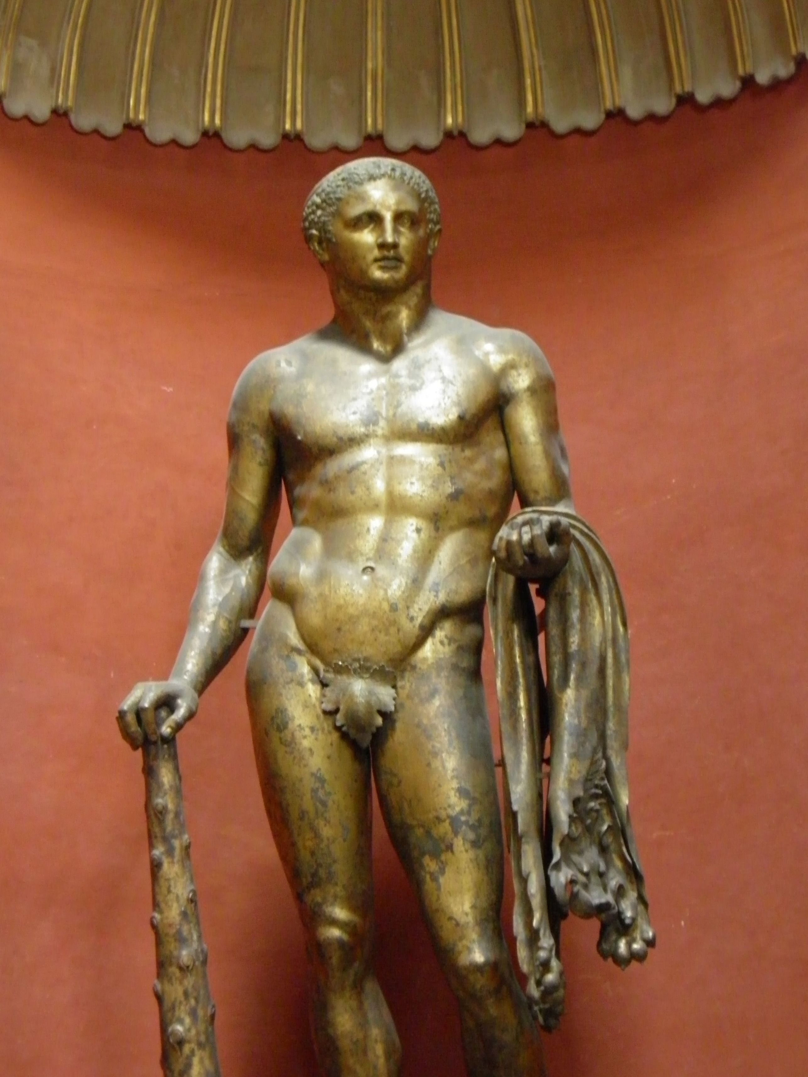 Statue d'Héraclès aux musées du Vatican (Vatican).